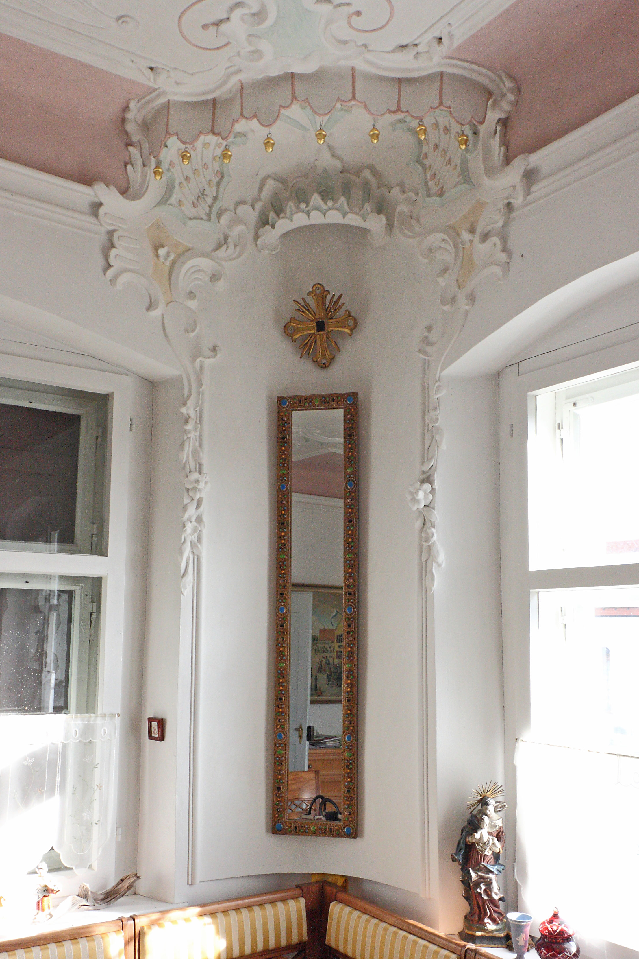 Stuckbaldachin in der Pfarrerwohnung im 1. Stock